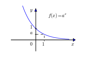 Esboço do gráfico de uma função exponencial decrescente.